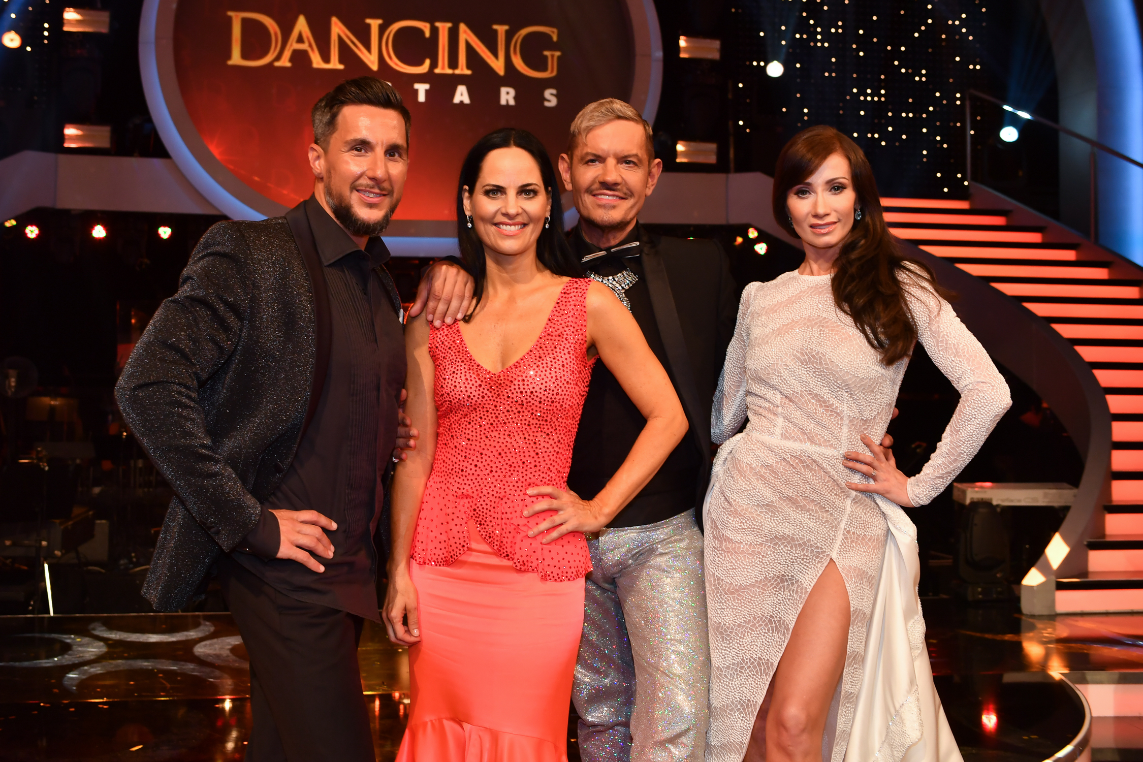 ORF Dancing Stars Finale am 2.6.2017 im ORF-Zentrum Wien. Bild zeigt die Jury: Balazs Ekker, Nicole Hansen, Dirk Heidemann und Karina Sarkissova.